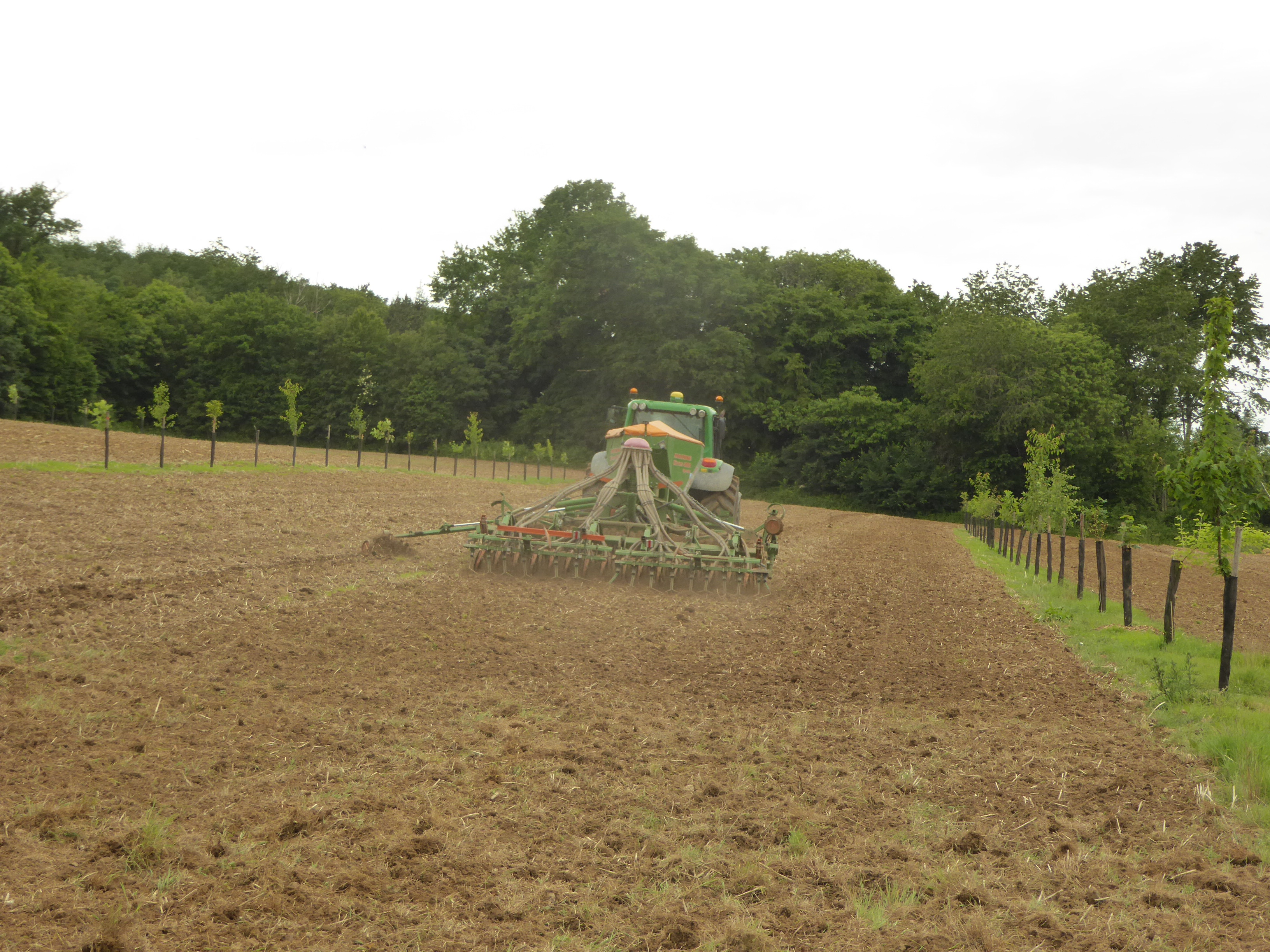 Semis de millet et plantation mélangée. Département de la Sarthe